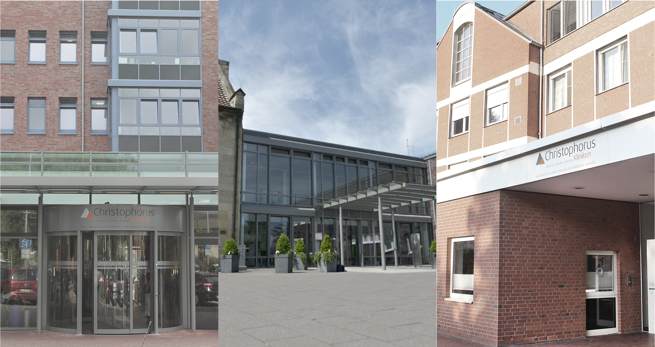 Ein Krankenhaus - drei Eingänge. Coesfeld, Duellen, Nottun.